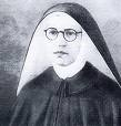 Sister Maria Pierina De Micheli